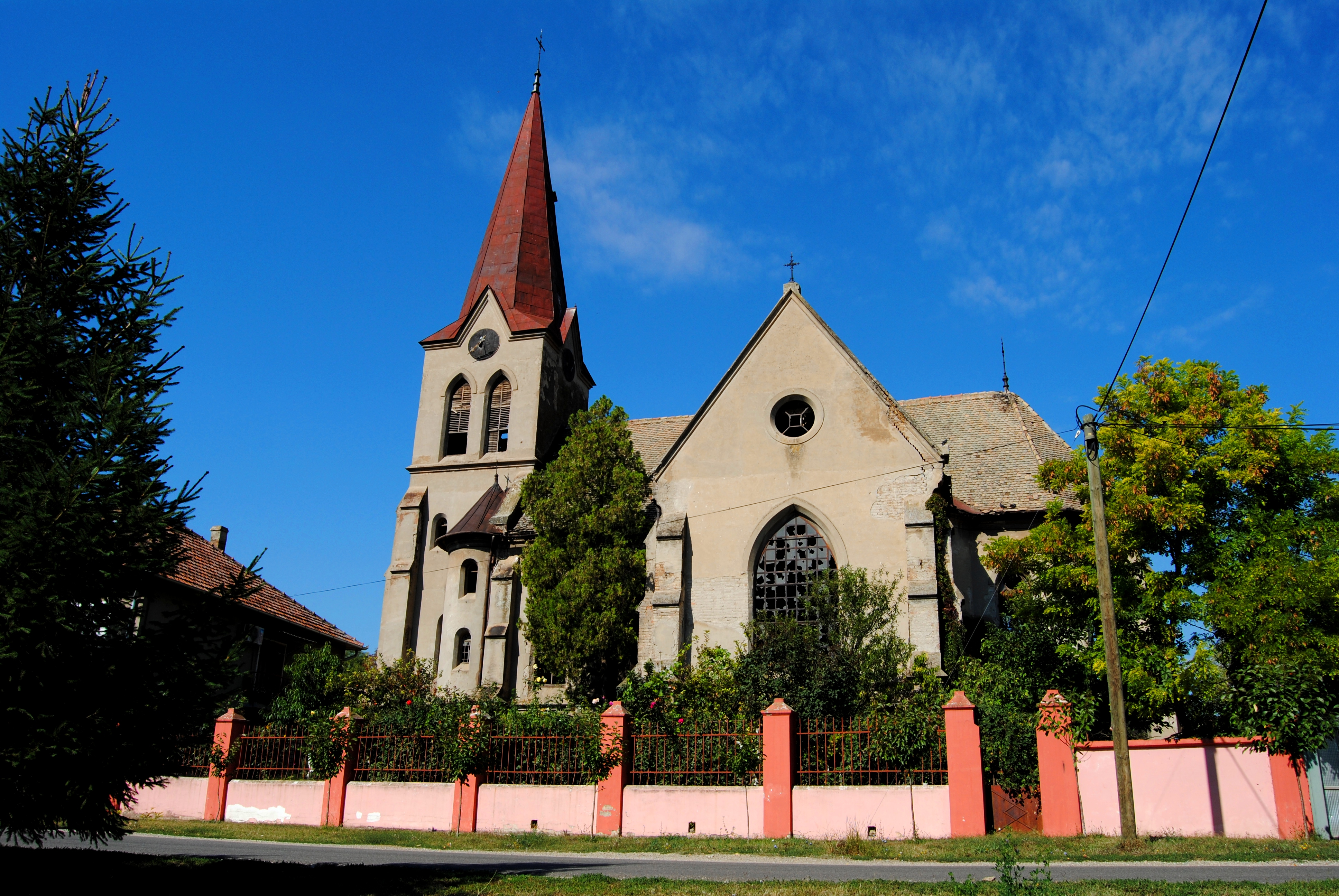 crkva "Svetog Ivana Nepomuka" u Putincima